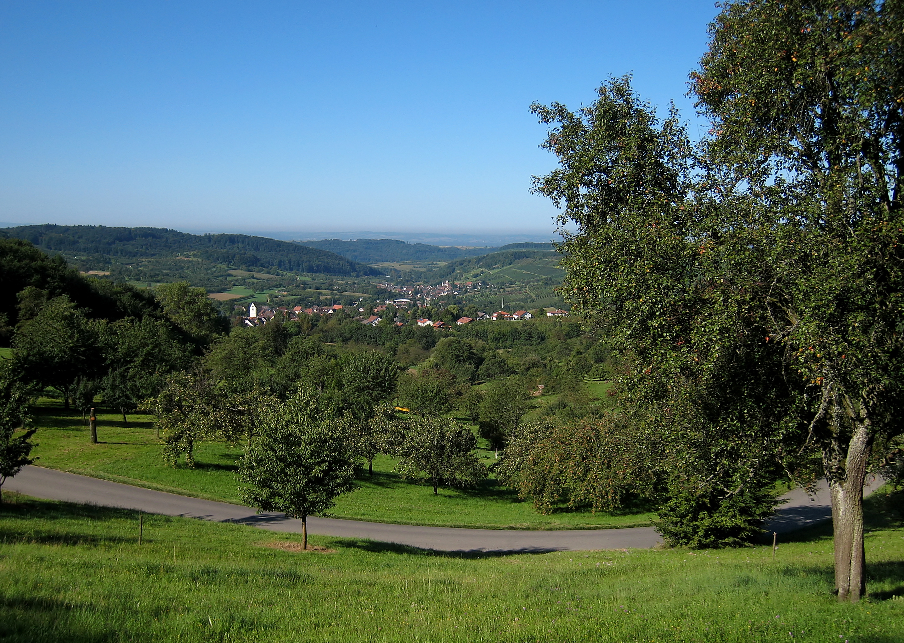 Schliengen im Markgräflerland: Blick auf die Ortsteile Ober- und Niedereggenen. Süd-Schwarzwald/Deutschland